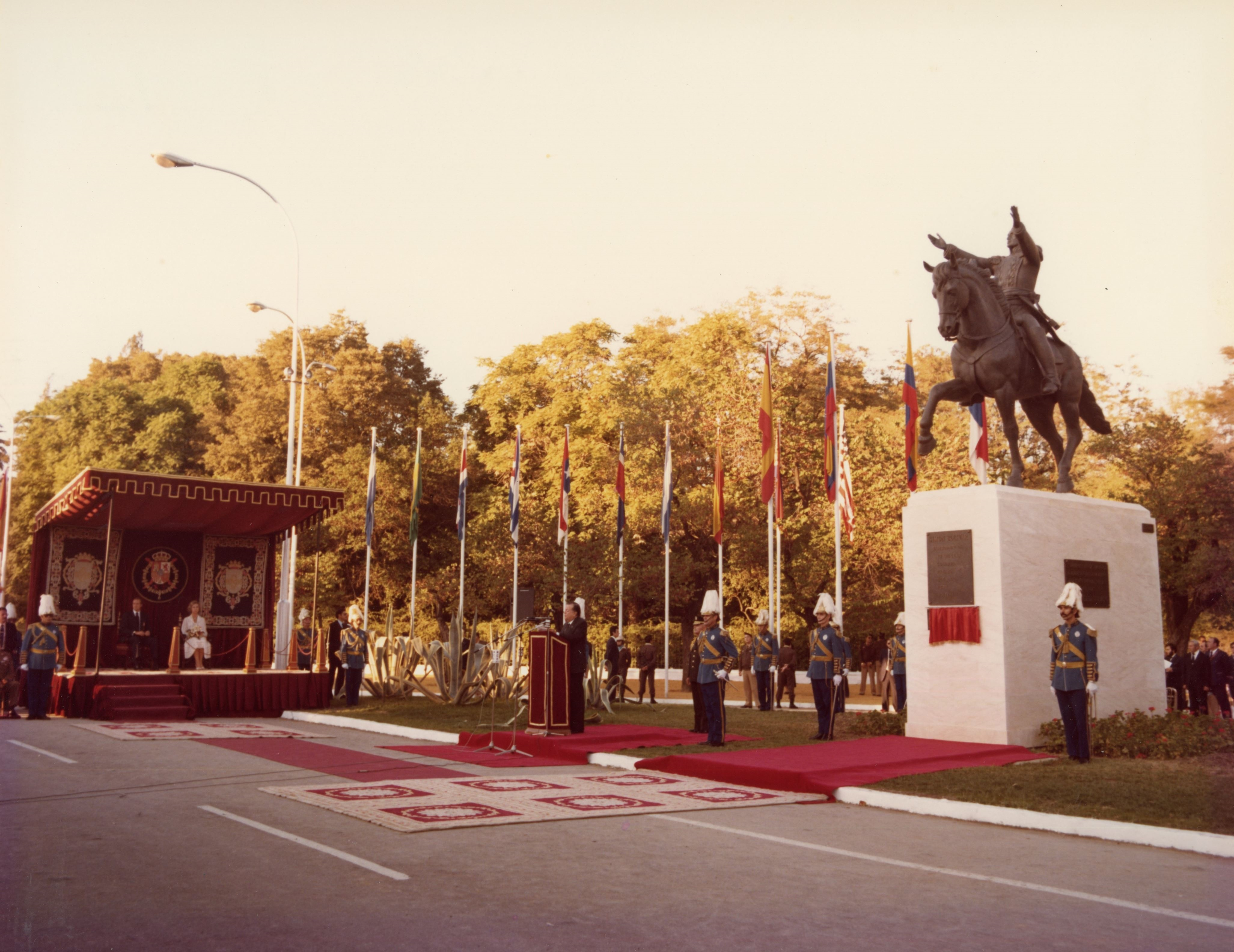 Inauguración del Monumento a Simón Bolívar en Sevilla, con presencia de los reyes de España y el expresidente venezolano Rafael Caldera.